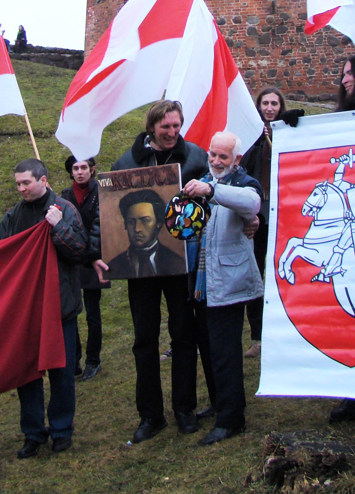 Aleś Puszkin (z lewej) i Chwiedar Niuńka (z prawej) na uroczystości z okazji rocznicy śmierci Konstantego Kalinowskiego. Wilno, 21 marca 2010 r.